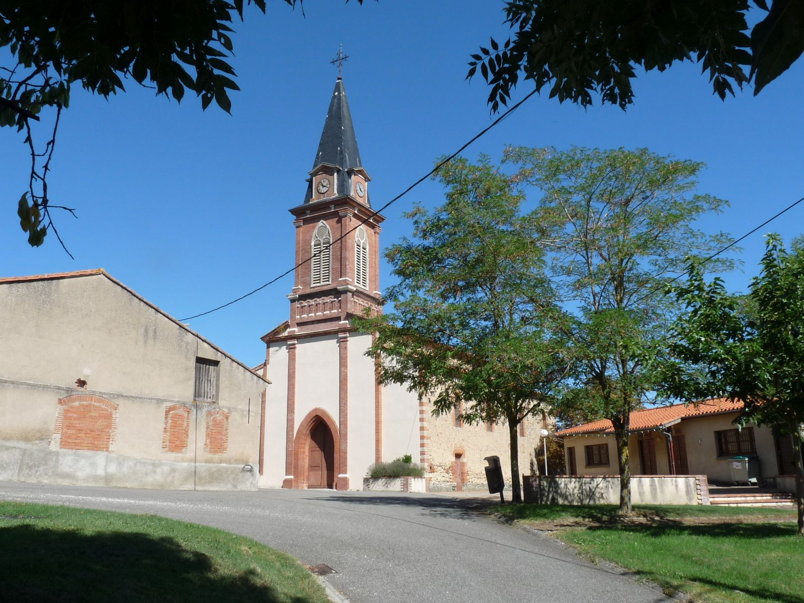 Eglise de Cessales, Haute-Garonne, France